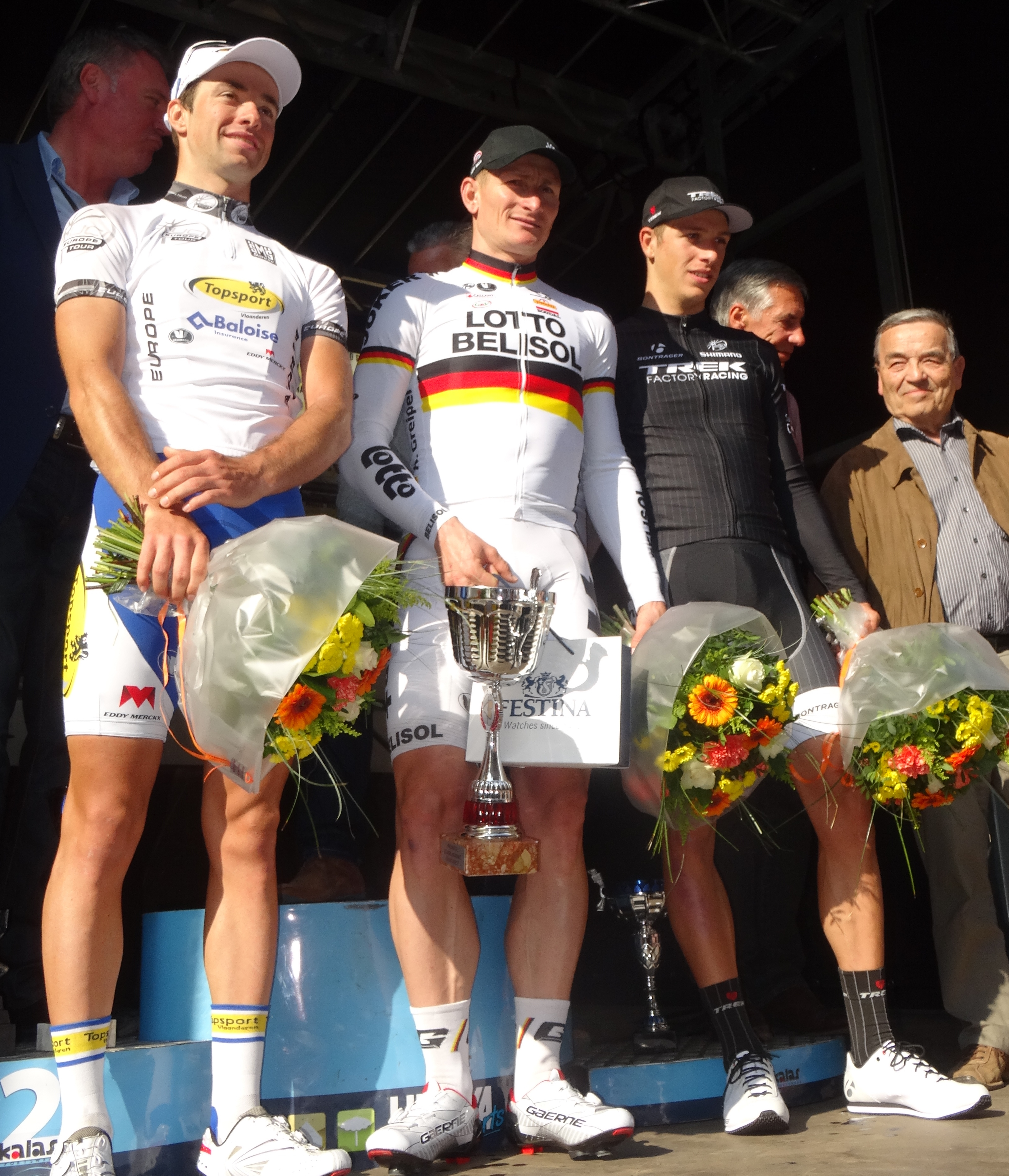 Reportage photographique réalisé le dimanche 14 septembre à l'occasion du départ et de l'arrivée du Grand Prix Jef Scherens 2014 à Louvain, Belgique.